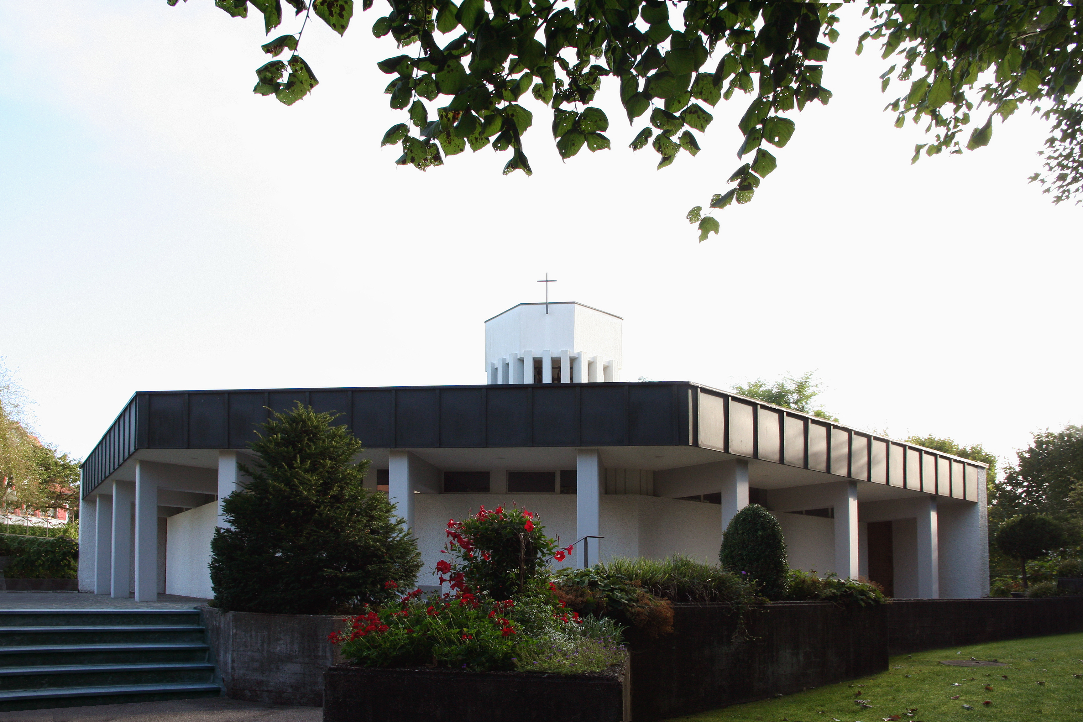 röm.-kath. Kirche St. Antonius Hauptwil Thurgau